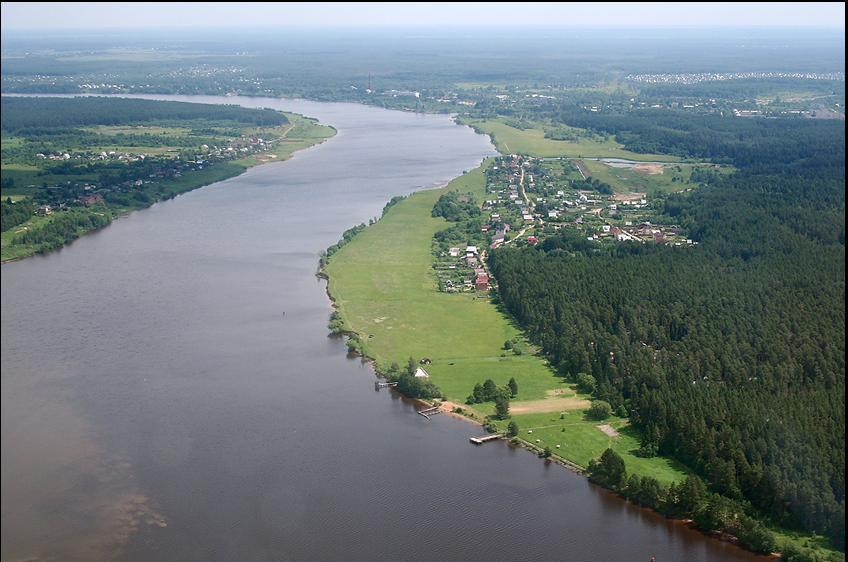 Фото деревни Нутрома Кимрского района Тверской области (справа по курсу) с борта самолета Евгения Павленко.